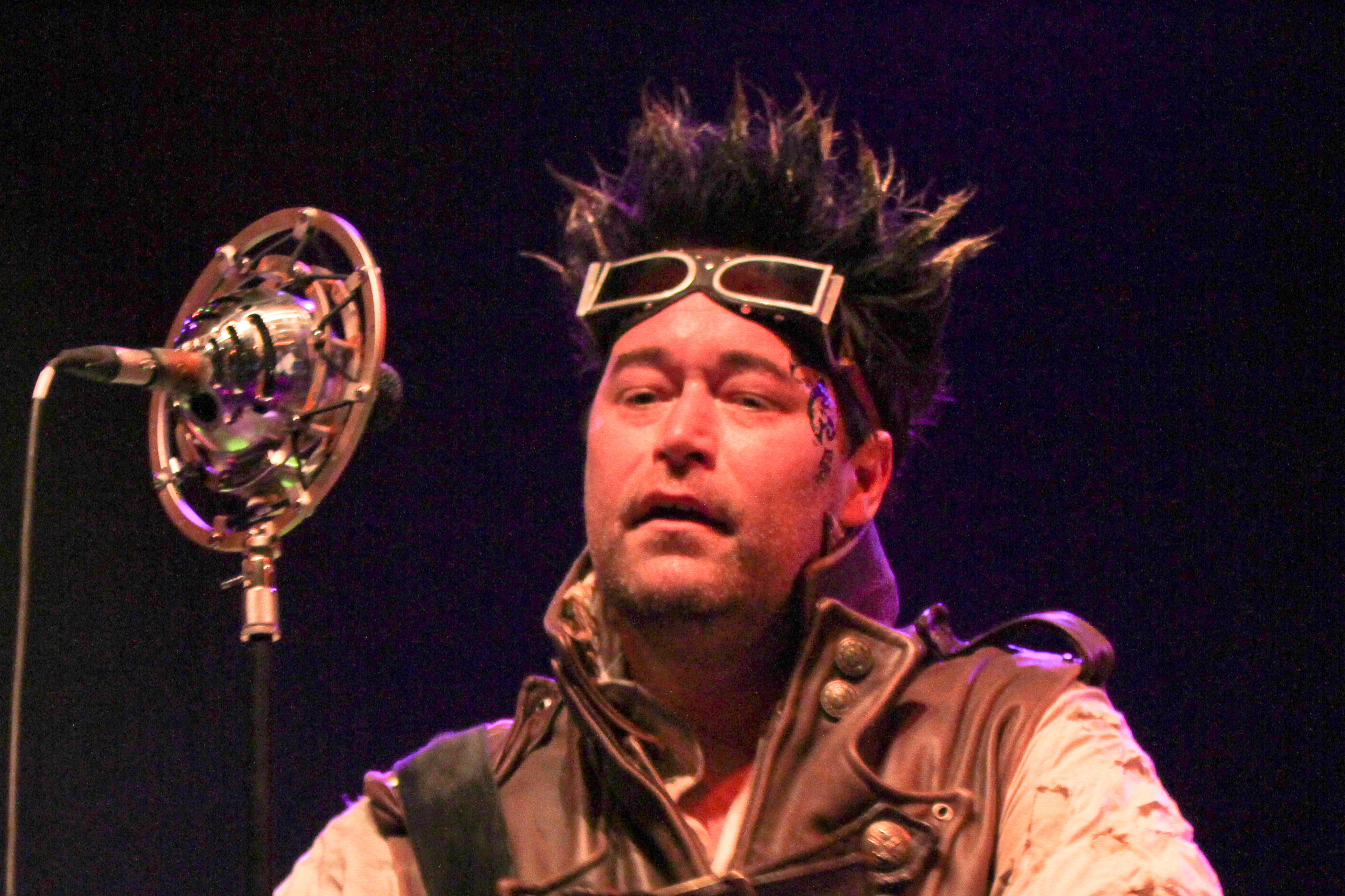 Abney Park auf dem Wave-Gotik-Treffen 2013 in Leipzig, Agra-Halle.